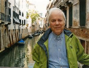 Marc Alyn à Venise